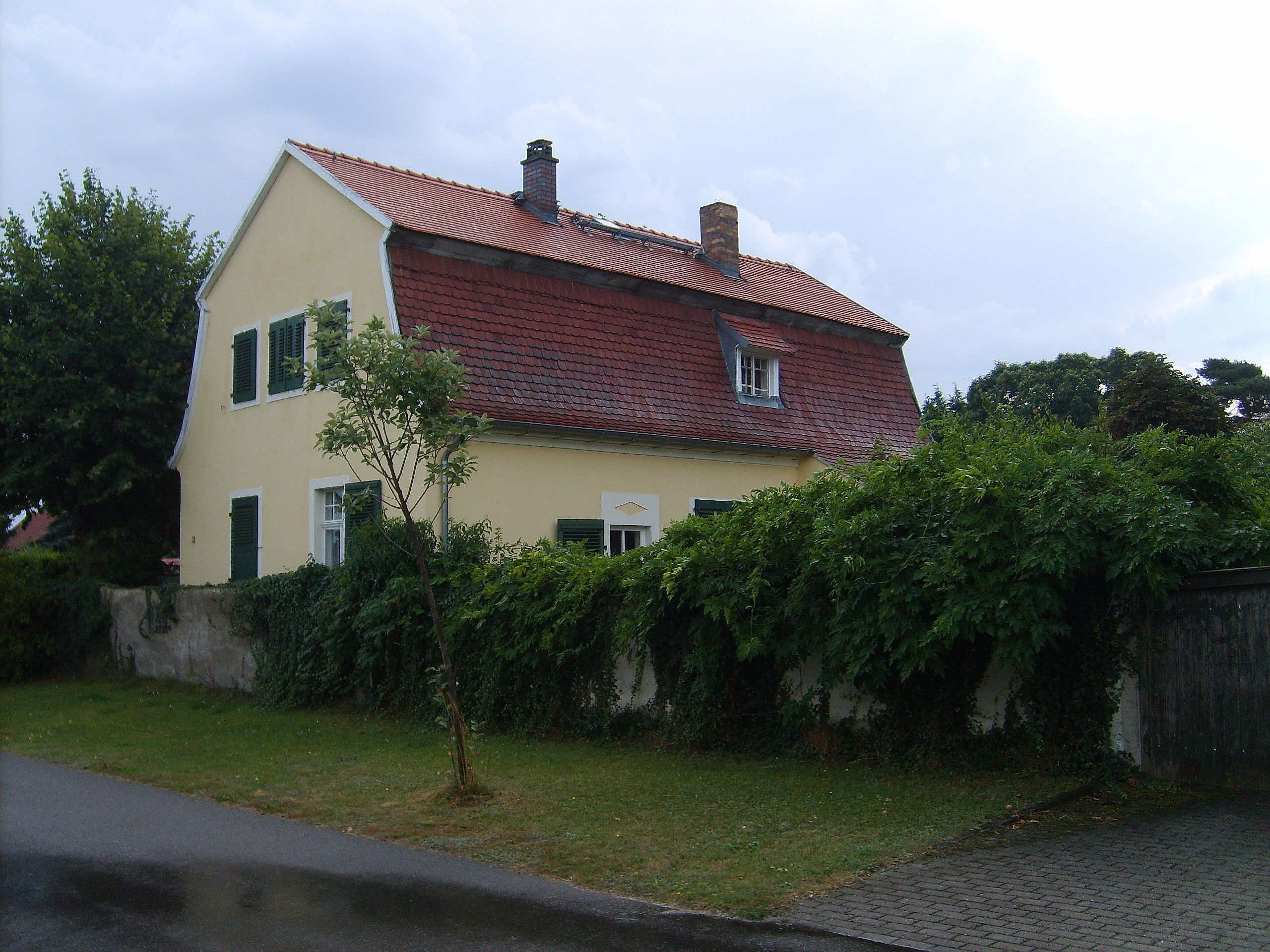 Haus von Hans Nadler in Gröden (Brandenburg)